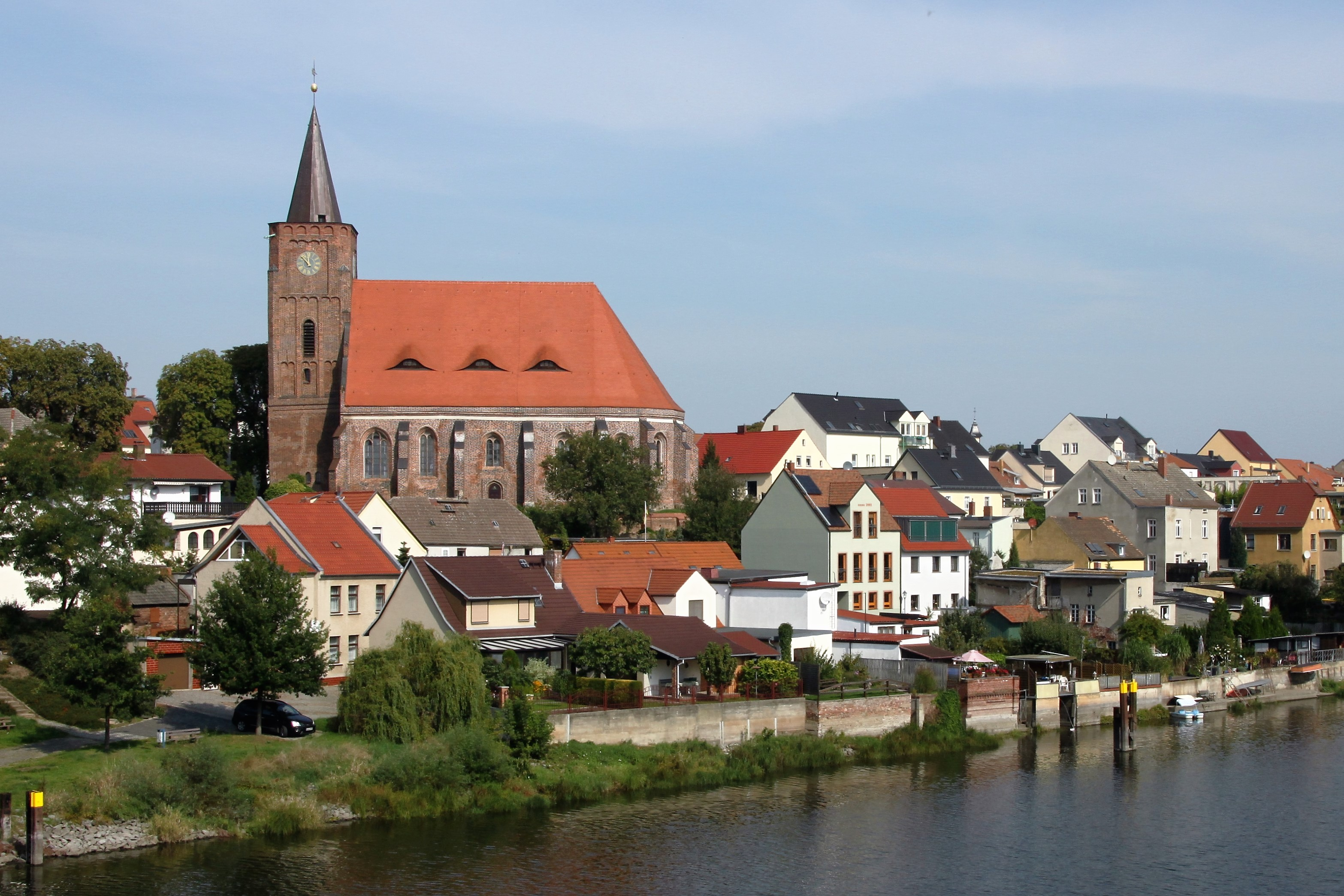 St. Nikolai Kirche, im Vordergrund Oder-Spree Kanal